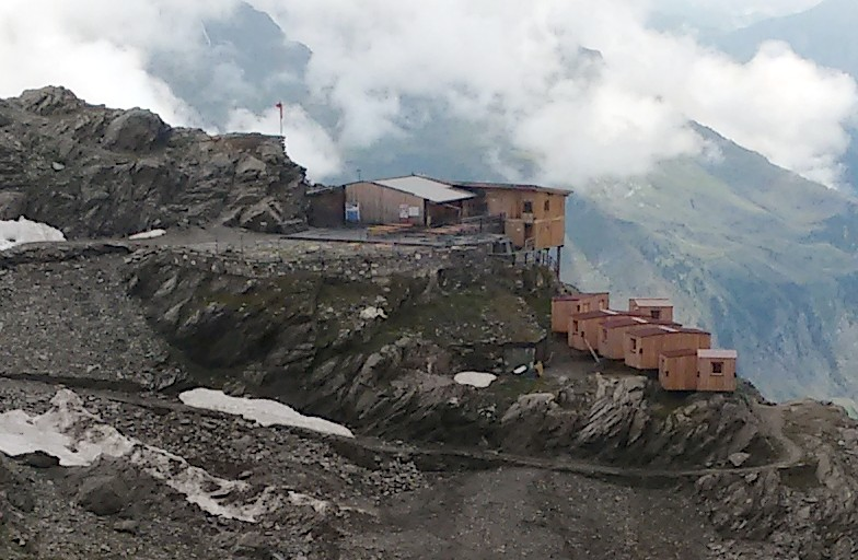 Ersatz der Stettiner Hütte am Eisjöchl bei Meran, Süd-Tirol /Alto Adige im August 2019